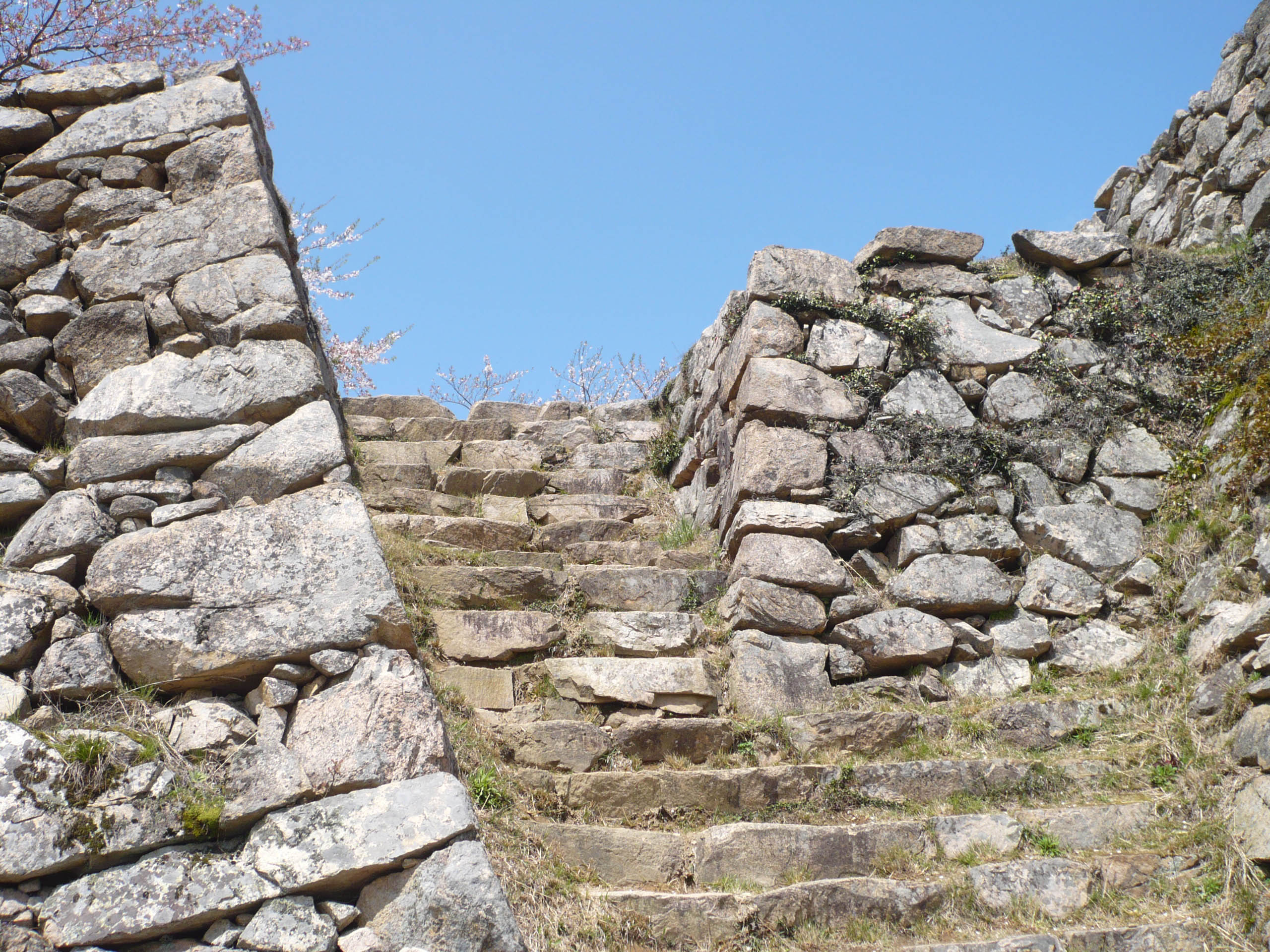 本丸への虎口跡